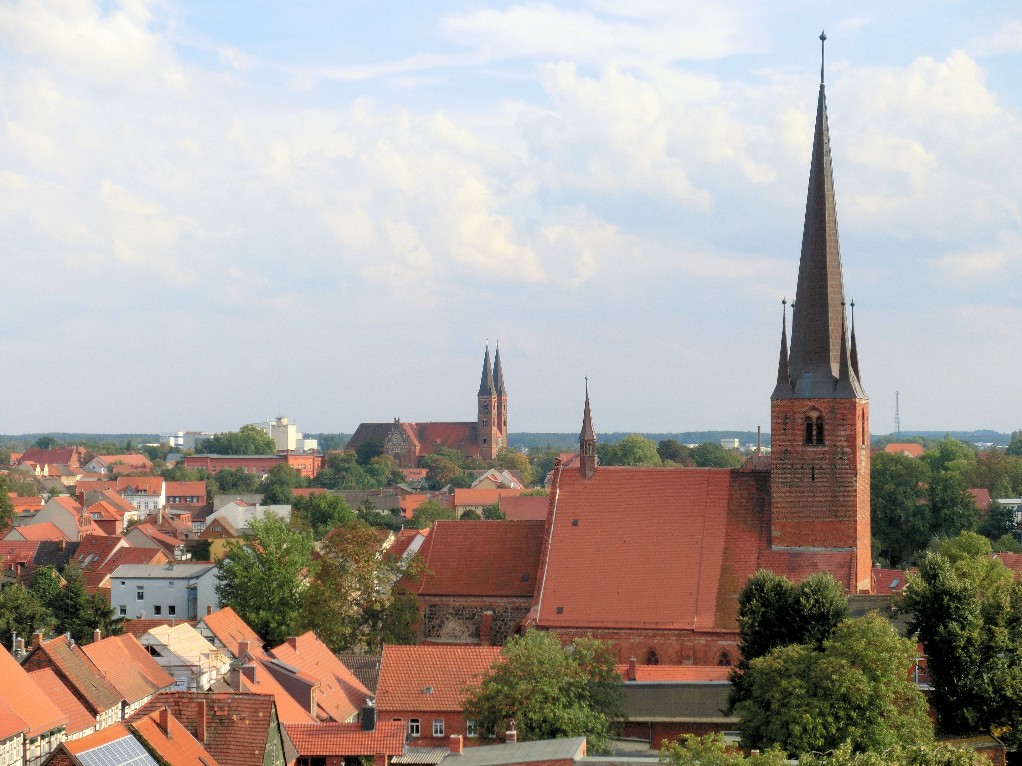 Stendal Petrikirche Dom St. Nikolaus